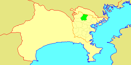 Map of Tsuzuki-ku, Yokohama, Kanagawa-prefecture, Japan